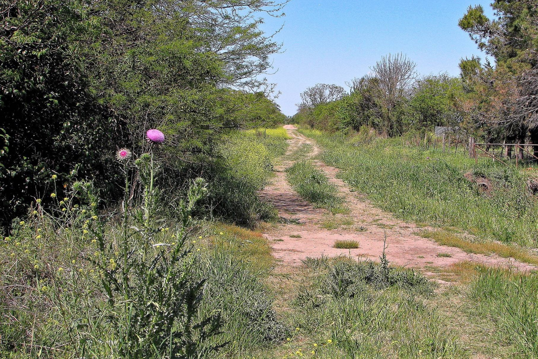 Descripción paisajística de la zona rural de Progreso (Santa Fe)